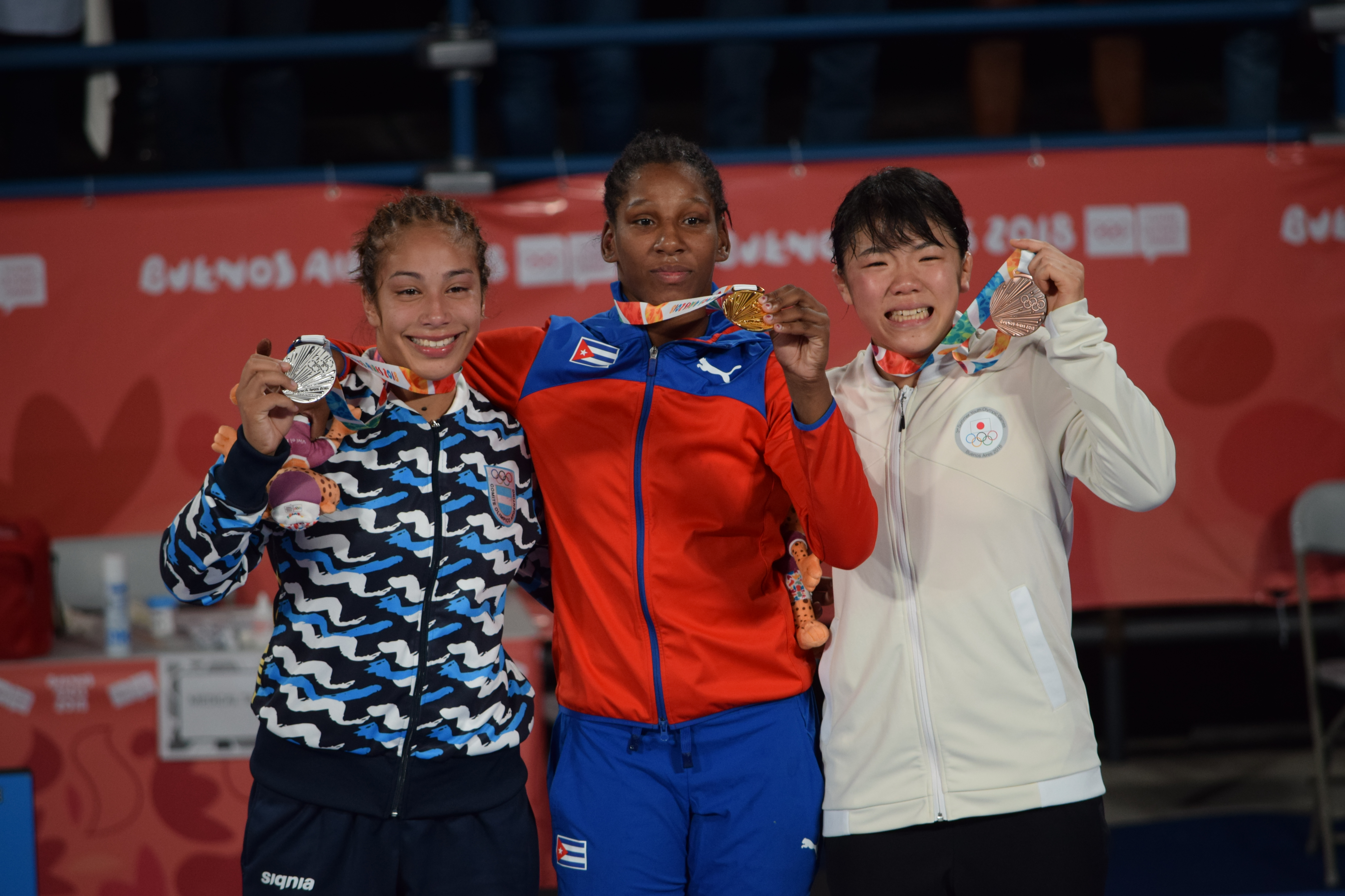 Ceremonia de premiación durante los Juegos Olímpicos de la Juventud 2018 en Buenos Aires. Noche del 13 de octubre. Milaimys de la Cari MARIN POTRILLE, Linda Marilina MACHUCA y Yuka KAGAMI.